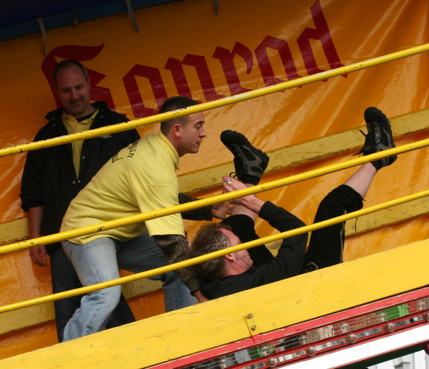 Konrad's Toboggan at Munich's Oktoberfest